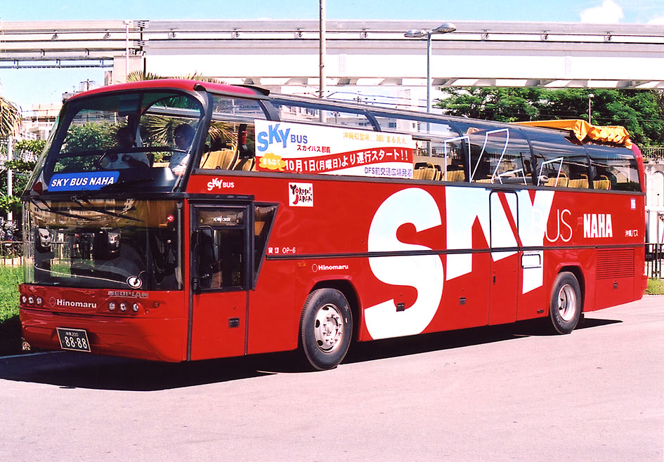 スカイバス那覇 ネオプランスペースライナーN117/2.